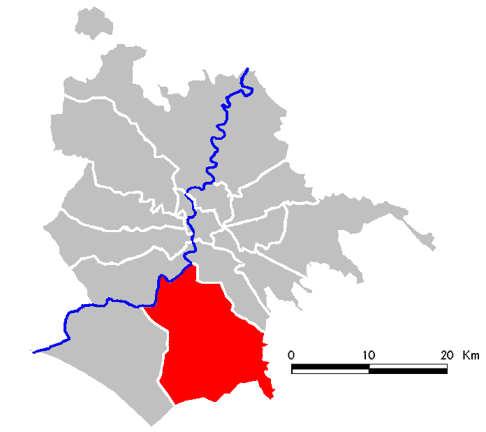 Municipio Roma IX